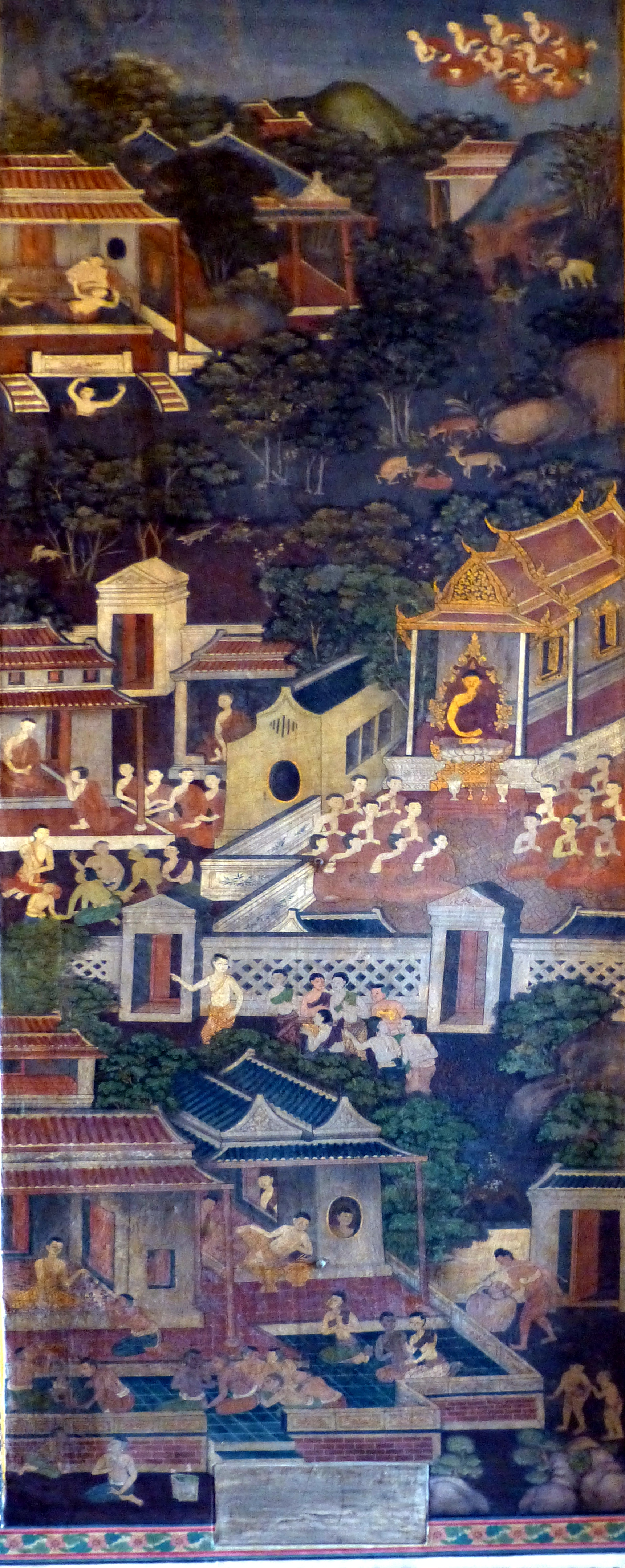 003 Uppalavanna, Wat Pho by Anandajoti Bhikkhu